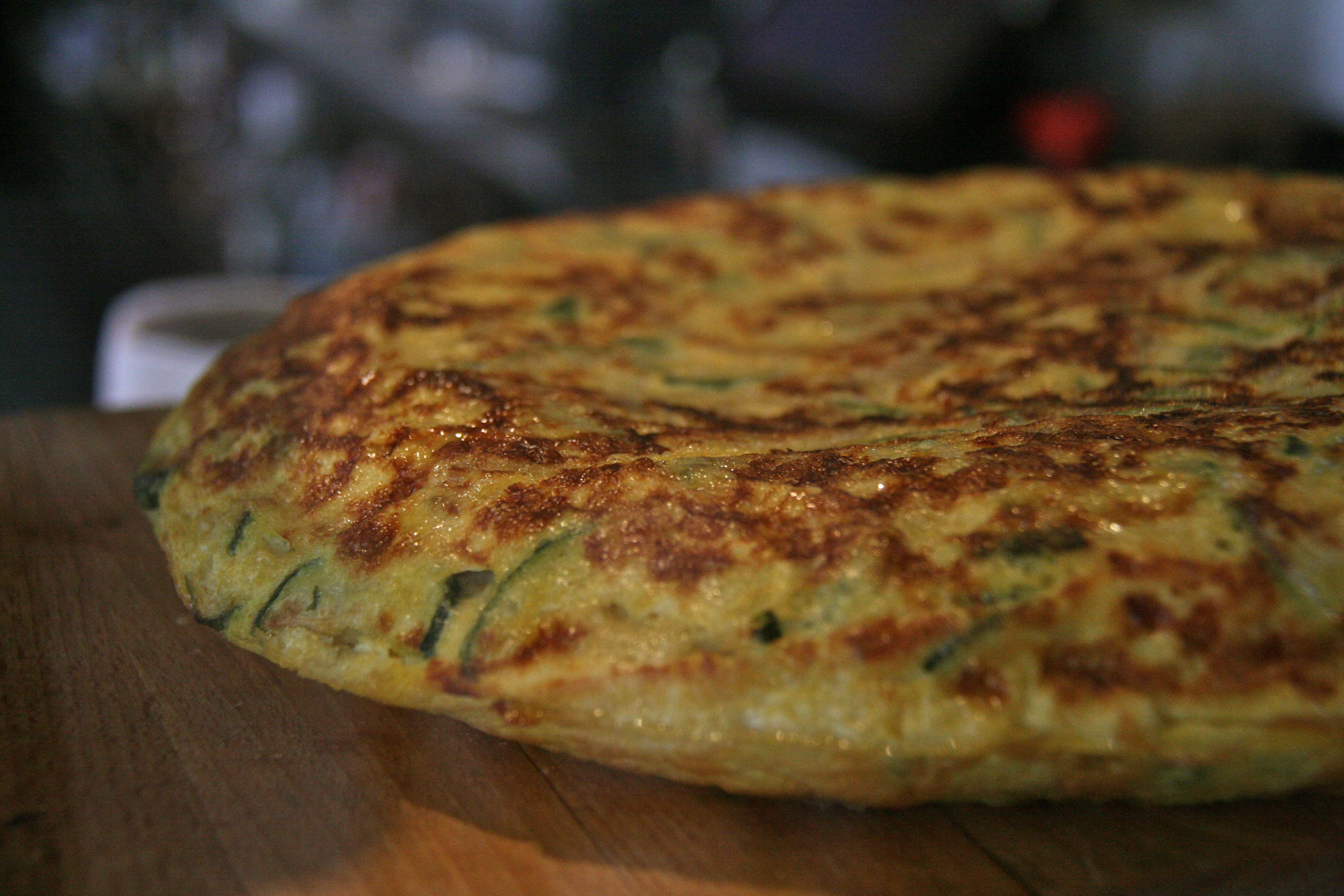 Tortilla de Pepinos